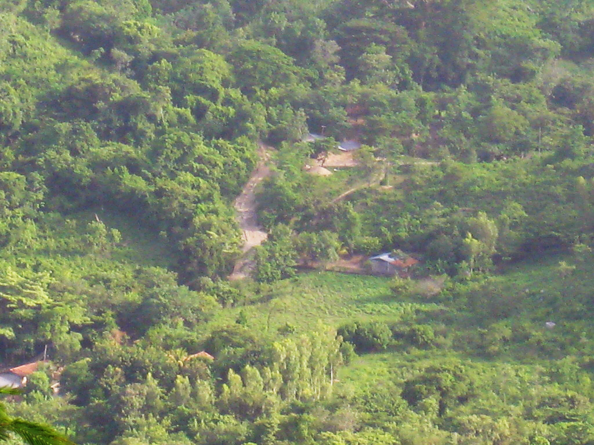 Es un barrio visto desde la cuspide del cerro san rafael en san juan de cinco pinos